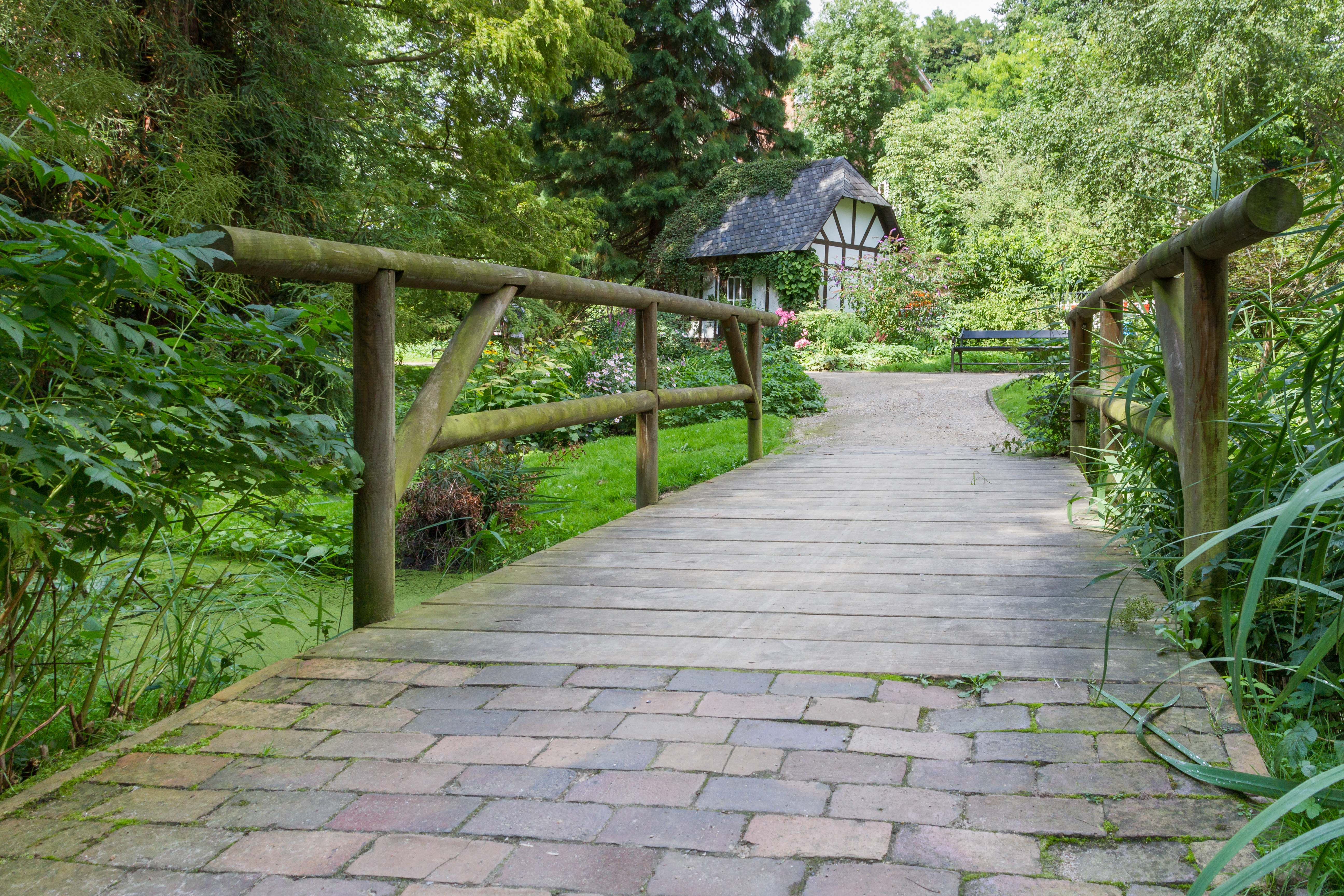 Im Alten Botanischen Garten Kiel